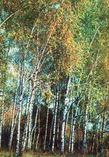 Парк-пам'ятка садово-паркового мистецтва "БЕРЕЗОВОРУДСЬКИЙ"